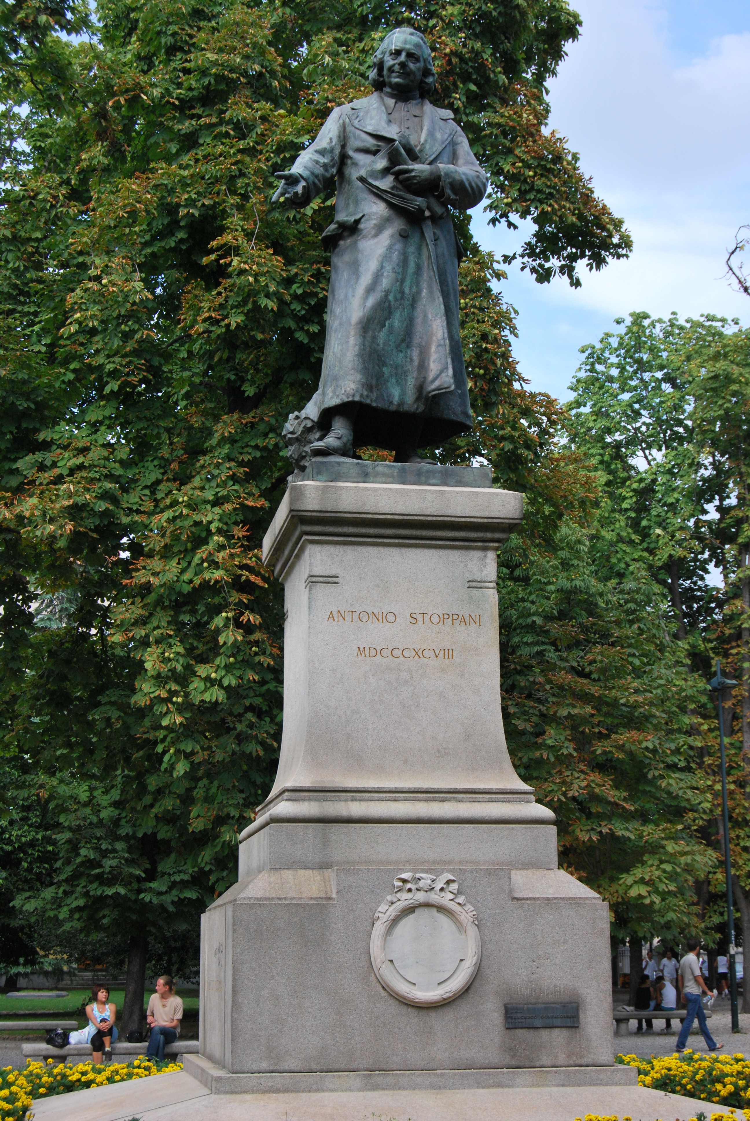 Monumento ad Antonio Stoppani This is a photo of a monument which is part of cultural heritage of Italy.